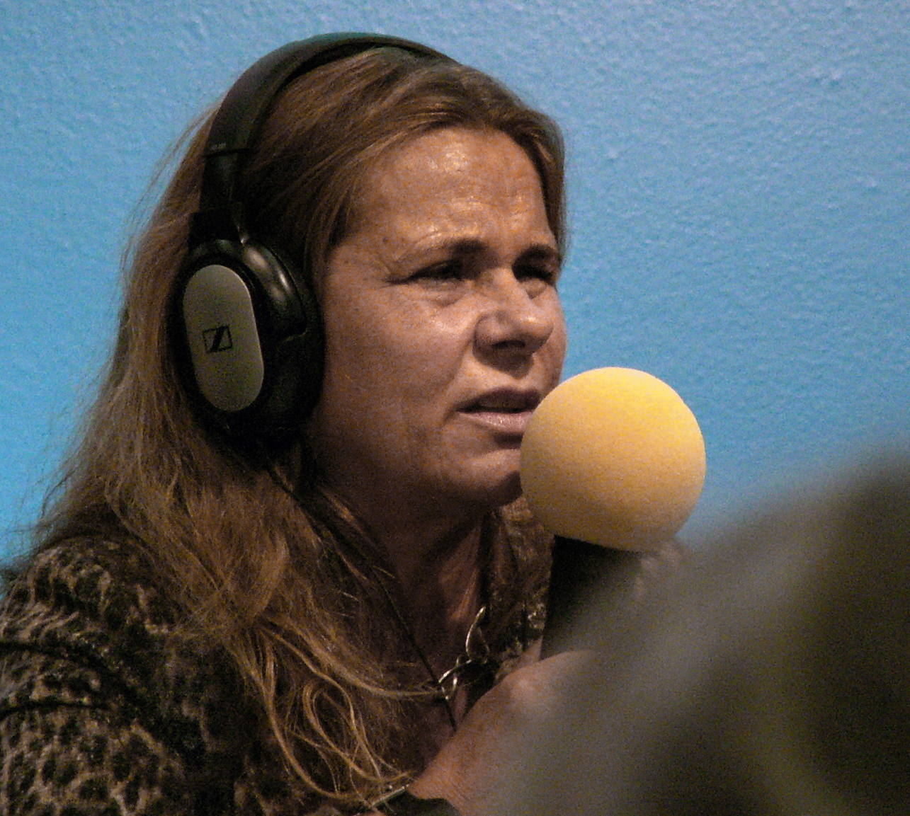 Katarina Hahr i Sveriges Radios monter på Bokmässan i Göteborg.